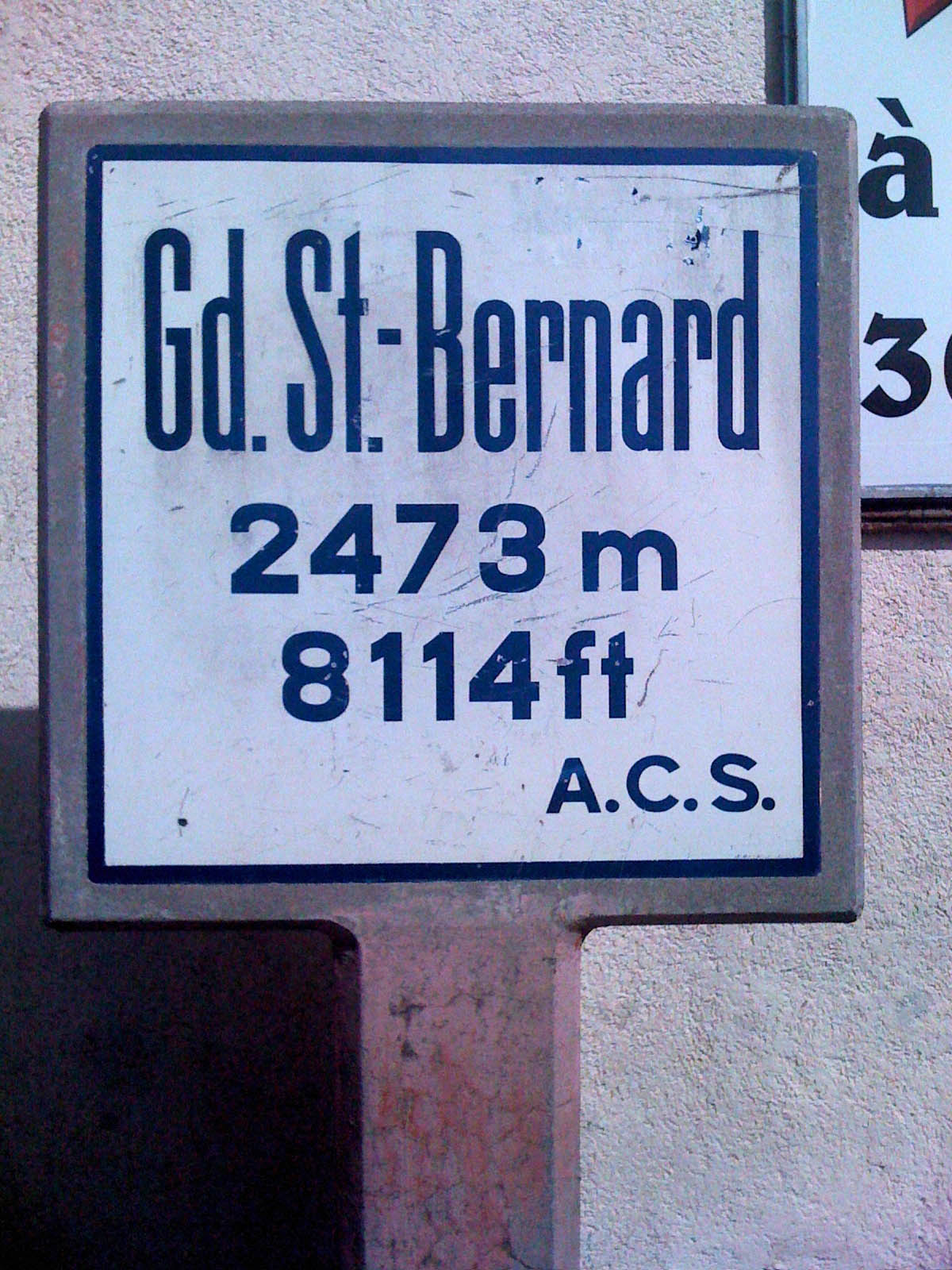 panneau de l'altitude officielle devant l'hospice du col du Grand Saint Bernard (Suisse, Valais)